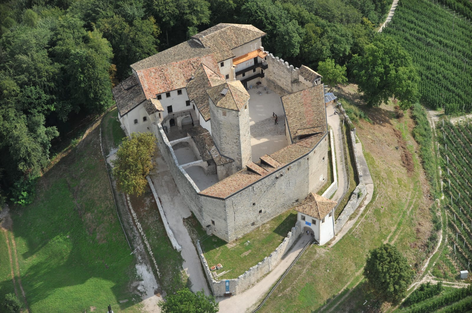 foto Castel Belasi 2019